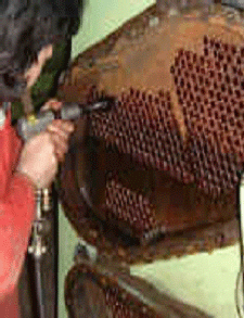 การทำความสะอาดเครื่องแลกเปลี่ยนความร้อนโดยใช้แรงดันน้ำ